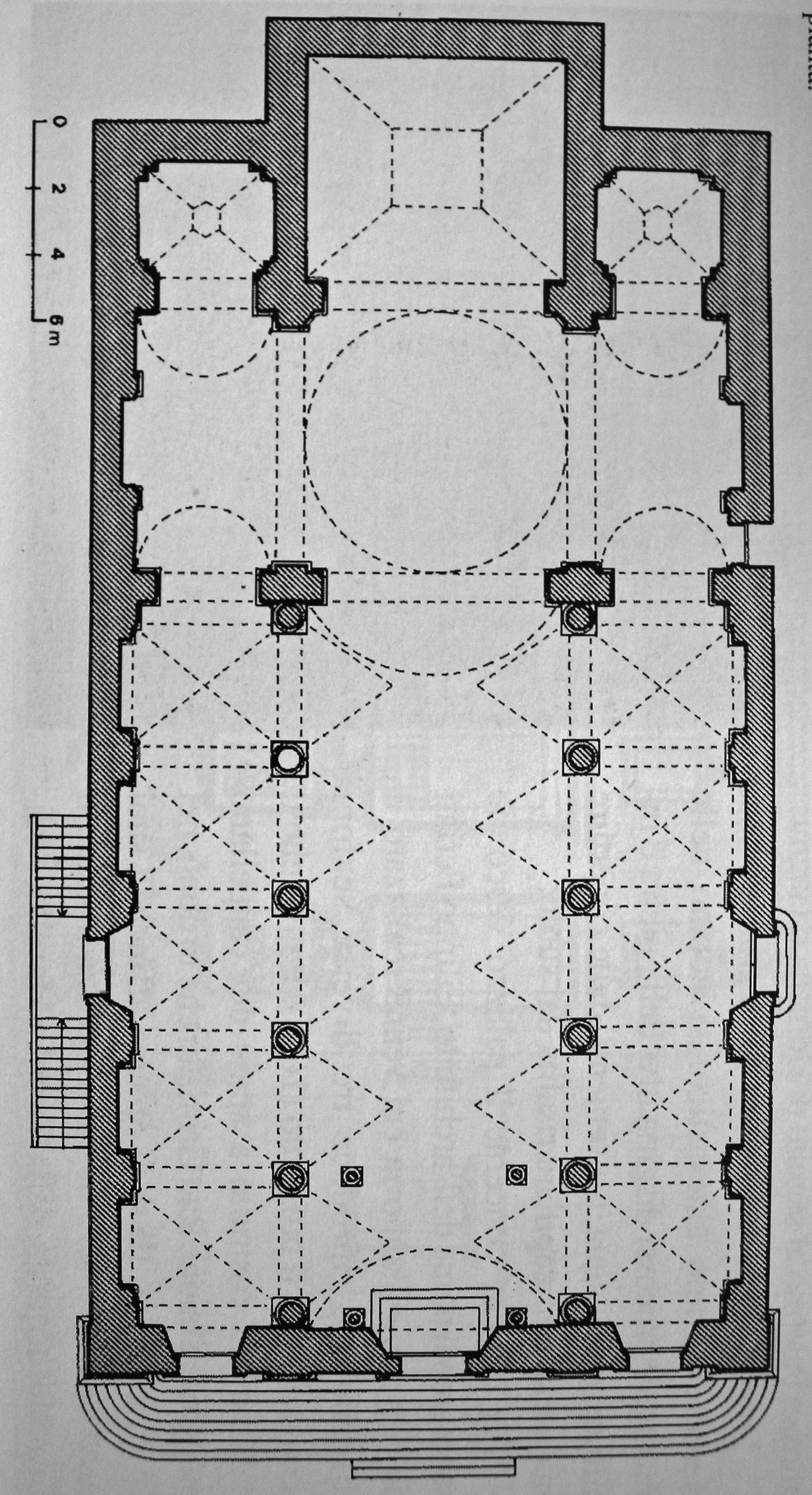 Piantina Cattedrale Santa Lucia del Mela